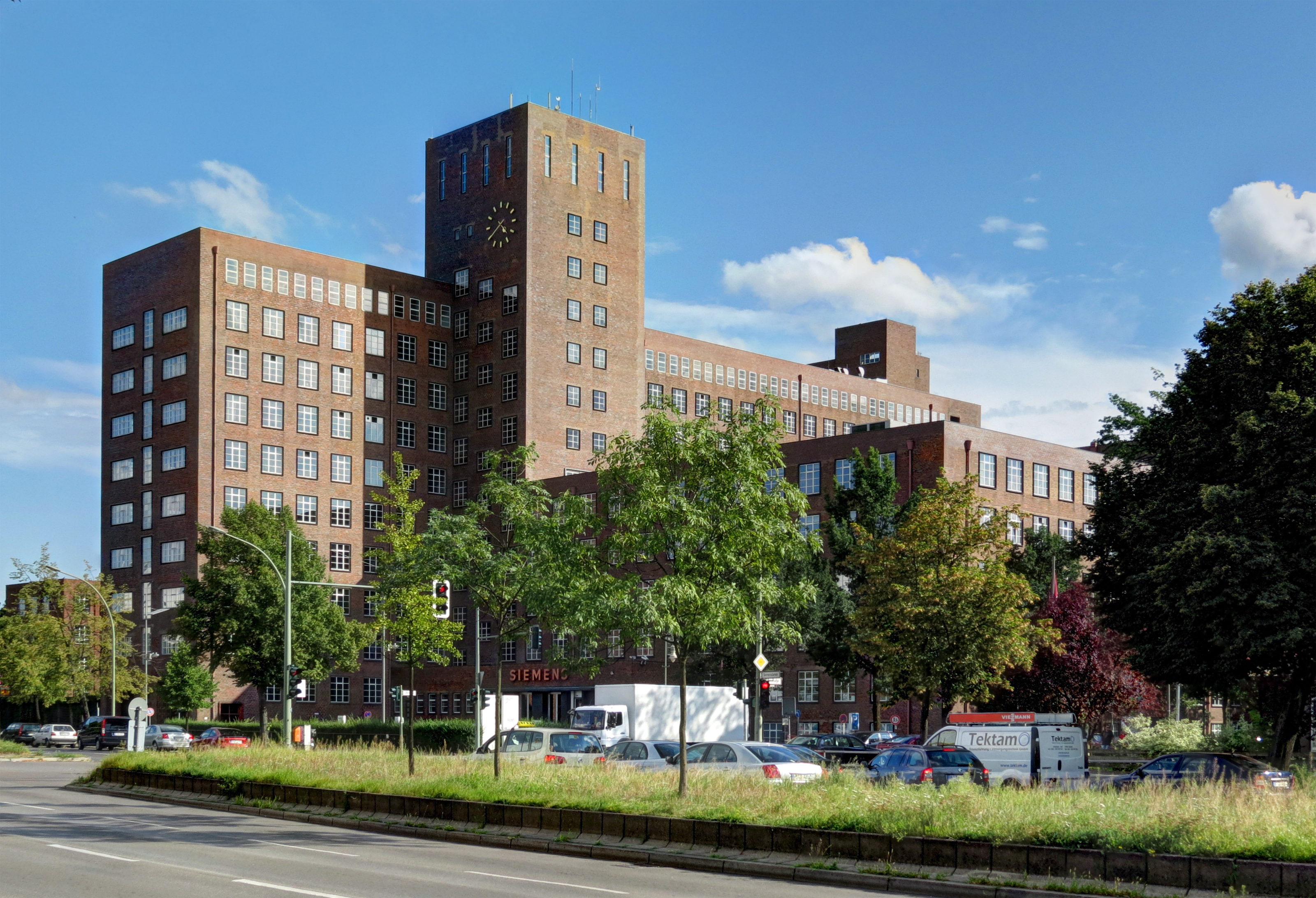 Wernerwerk-Hochhaus, Siemensdamm